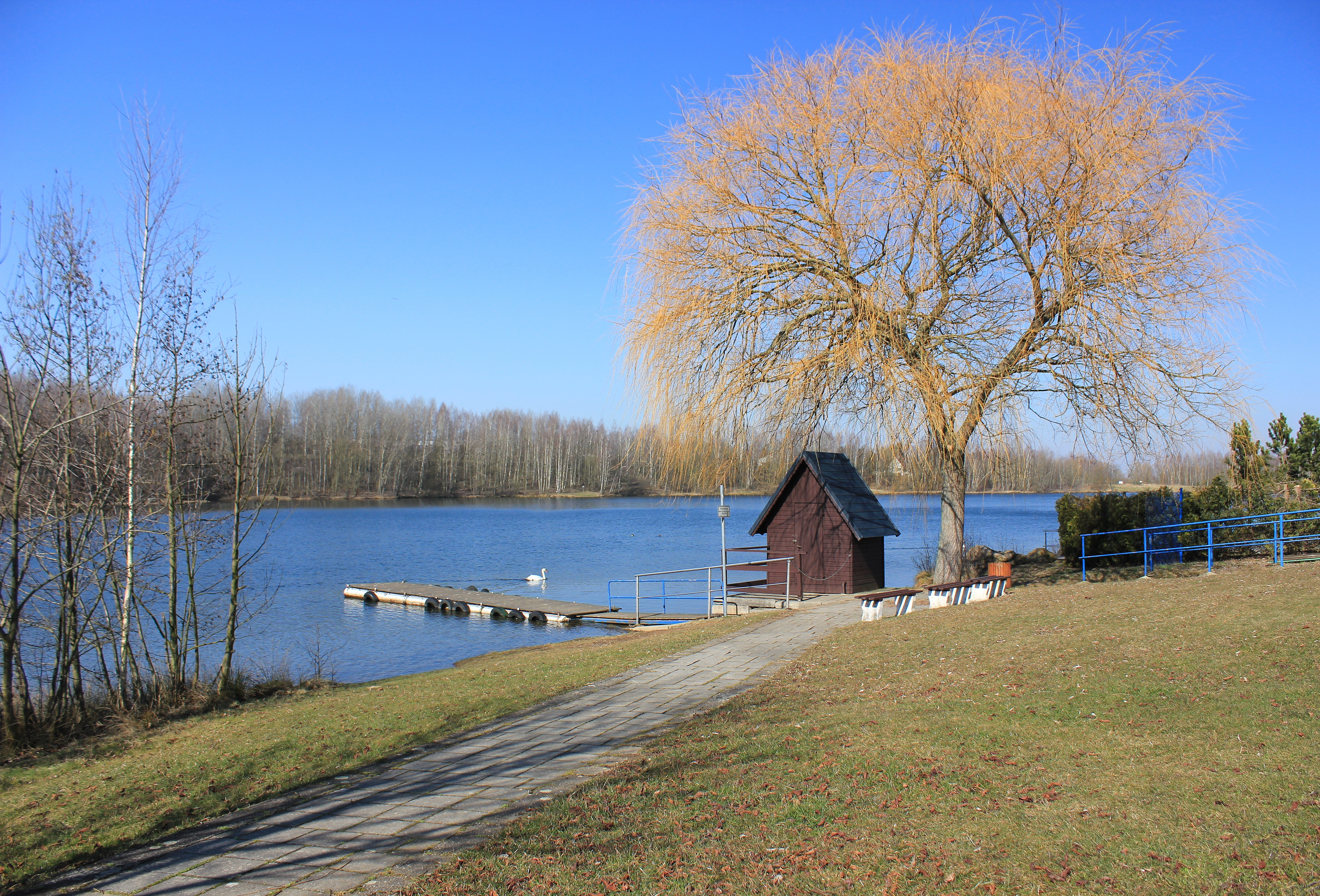 Stausee Oberwald in Callenberg, Landkreis Zwickau, Sachsen.